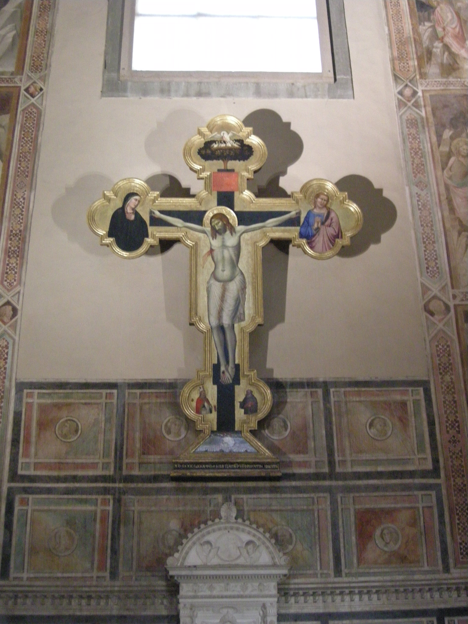 Cappella castellani 21 crocifisso di niccolò gerini